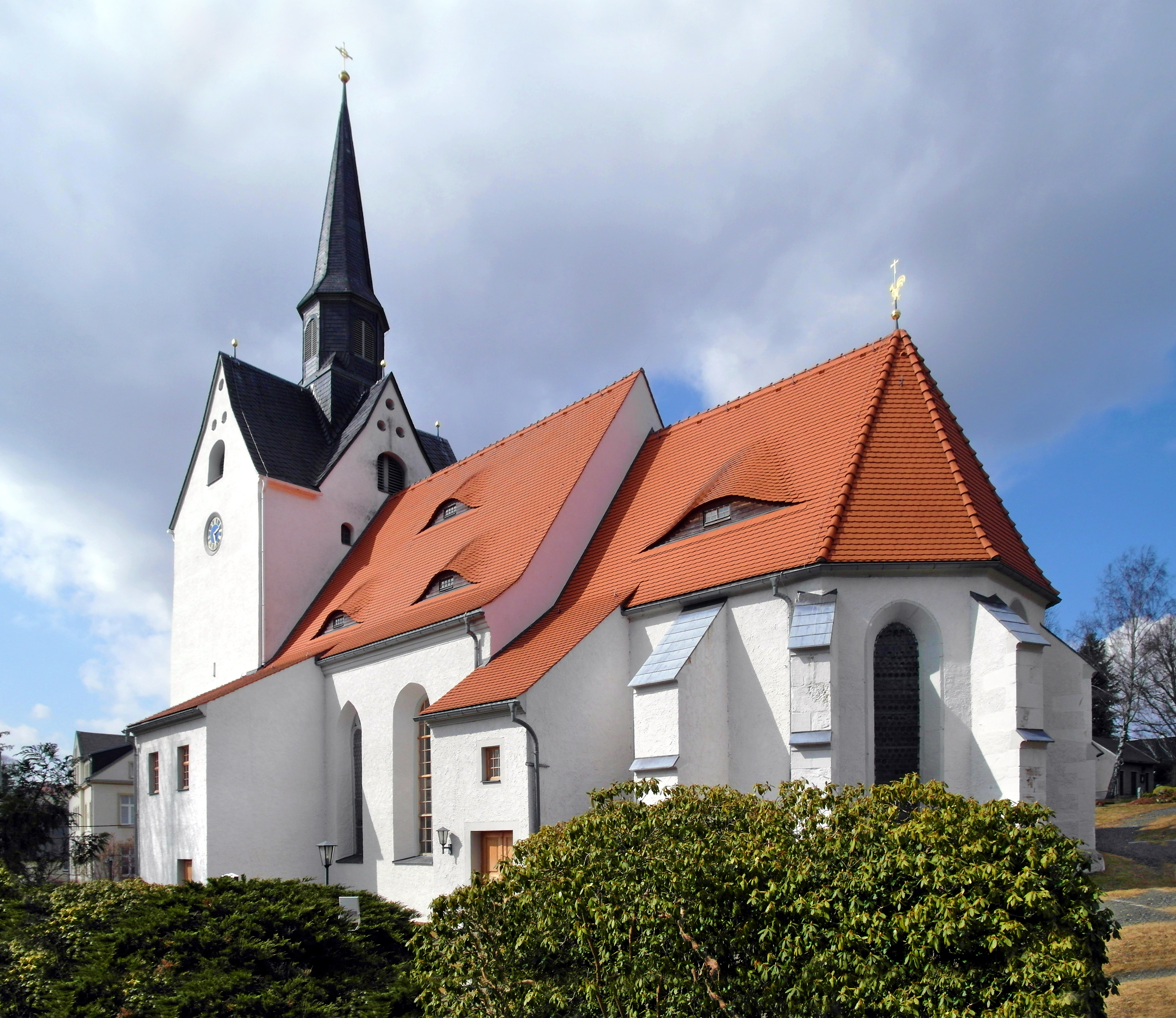 27.03.2018 09603 Großschirma, bei Hauptstraße 50 (GMP: 50.966268,13.300956): Wehrkirche. Der Bau des Wehrturmes der Kirche ist für 1221 als Vorposten des Zisterzienser- klosters Altzella gesichert, kann wahrscheinlich aber früher datiert werden. An ihn wurden zwischen 1490 und 1503 ein Schiff und ein Chorraum mit eindrucksvollem Sternrippenge- wölbe gefügt. Die barocke Erneuerung der Saalkirche um 1727 erfolgte nach Plänen von Johann Christian Simon und Samuel Stecher. In der Kirche befindet sich eine Schubert-Orgel von 1884. Sicht von Südosten. [SAM4793.JPG]20180327105DR.JPG(c)Blobelt